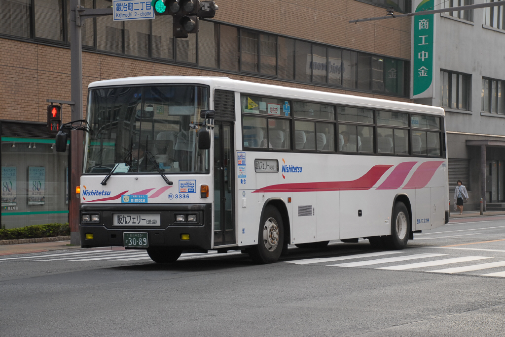 元高速車 阪九フェリー送迎へ 2016-4-16撮影